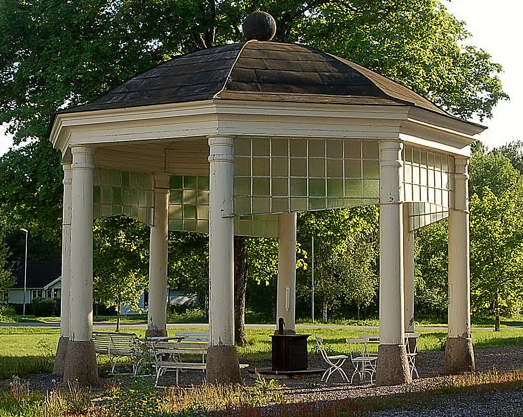 Paviljong byggd över den ursprungliga vattenkällan vid Porla Brunn. En teckning av denna paviljong avbildades på vattenflaskorna som levererades från Porla.